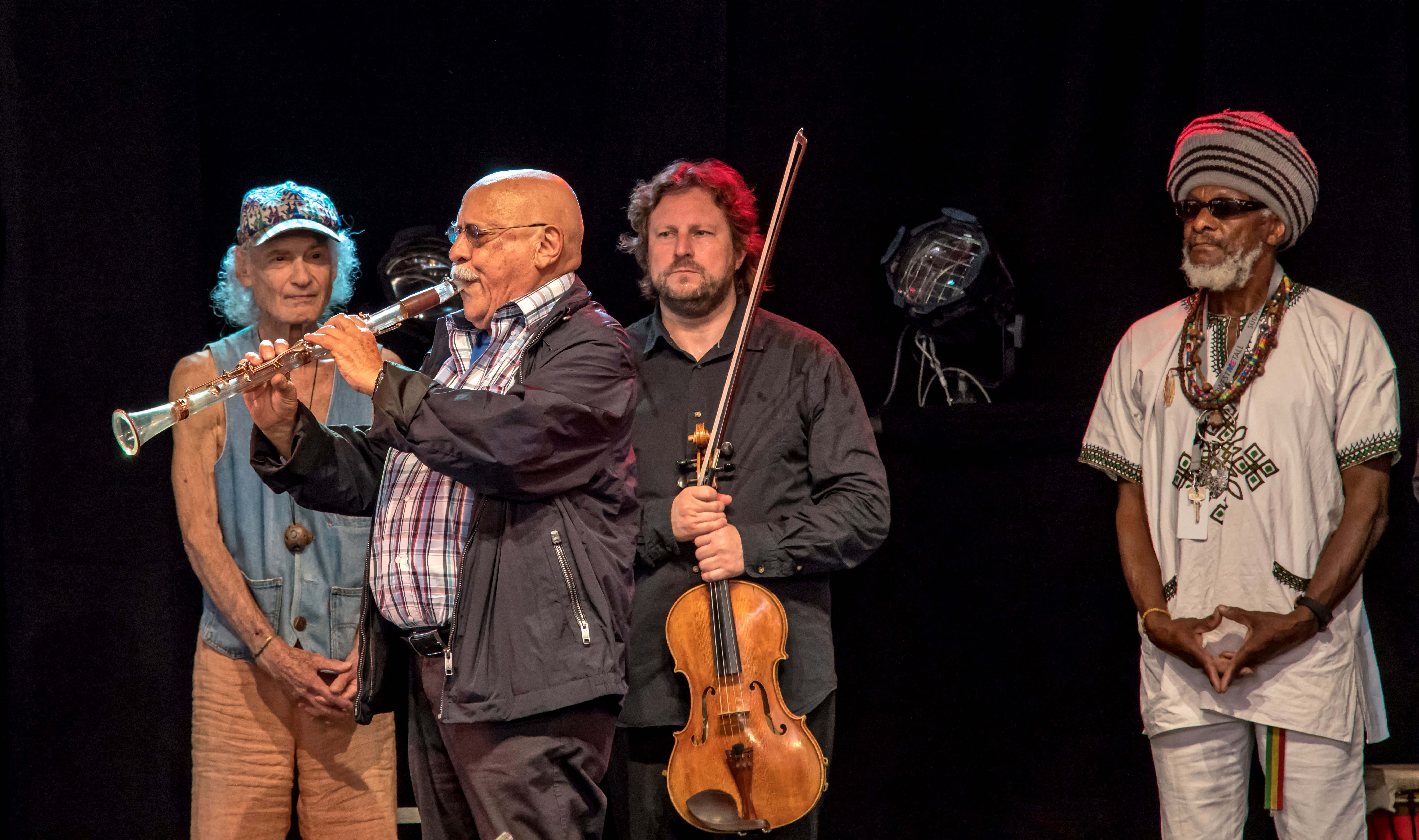 Bilder vom Zelt Musik Festival 2016 in Freiburg im Breisgau Klassik-Matinee „Von Bach bis Tango“ Enrique Ugarte (Akk), Raúl Alvarellos-Benari (Kl.), Gershwin Quartett (Streicher), Matthias Matzke (Akk.), Perry Robinson & Gerald Achee (Kl. & Perk.), Manuel Druminski (Vl.), Murat Cos˛kuns (Perk.)